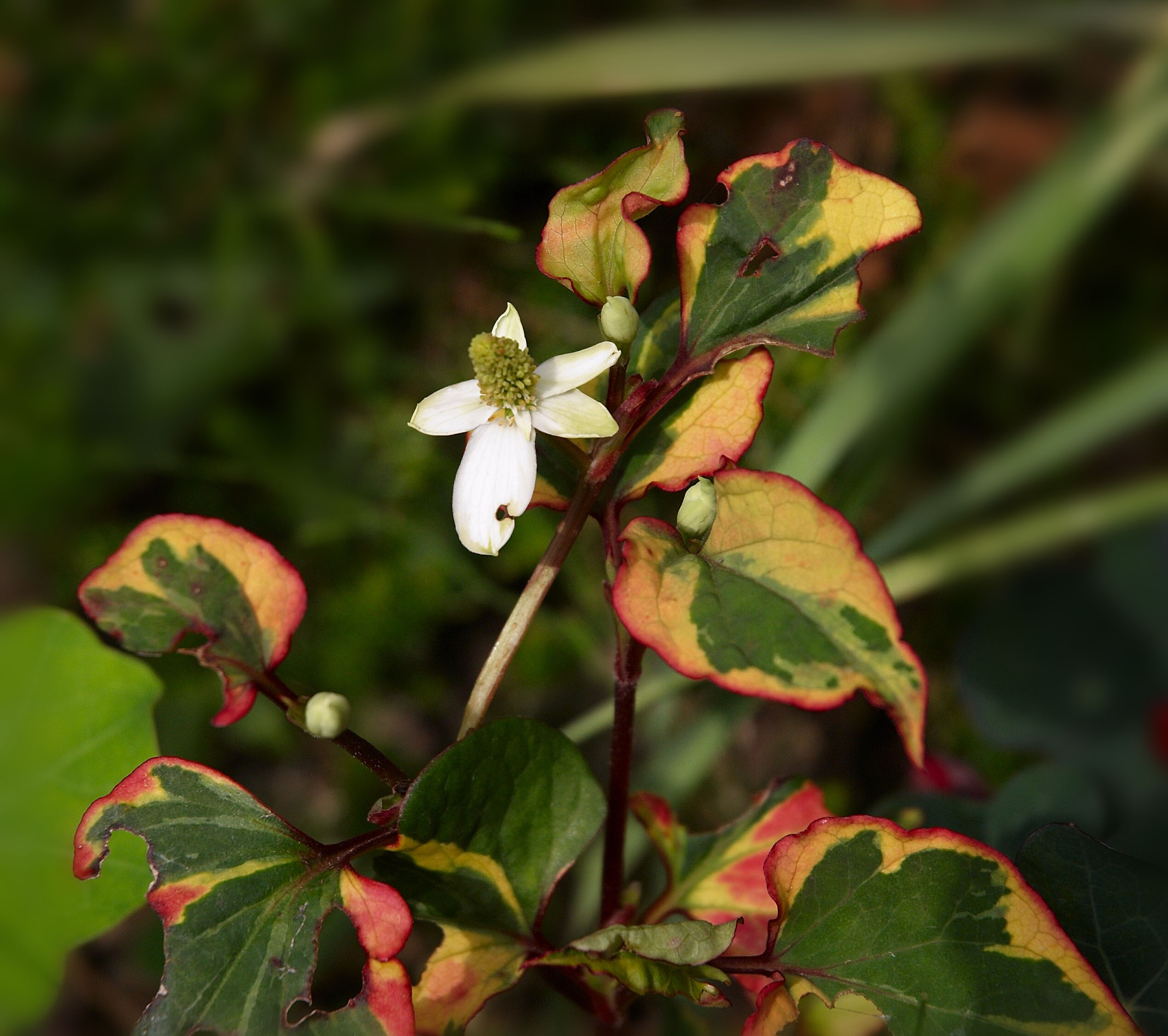 Houttuynia cordata ‘Chamelion’